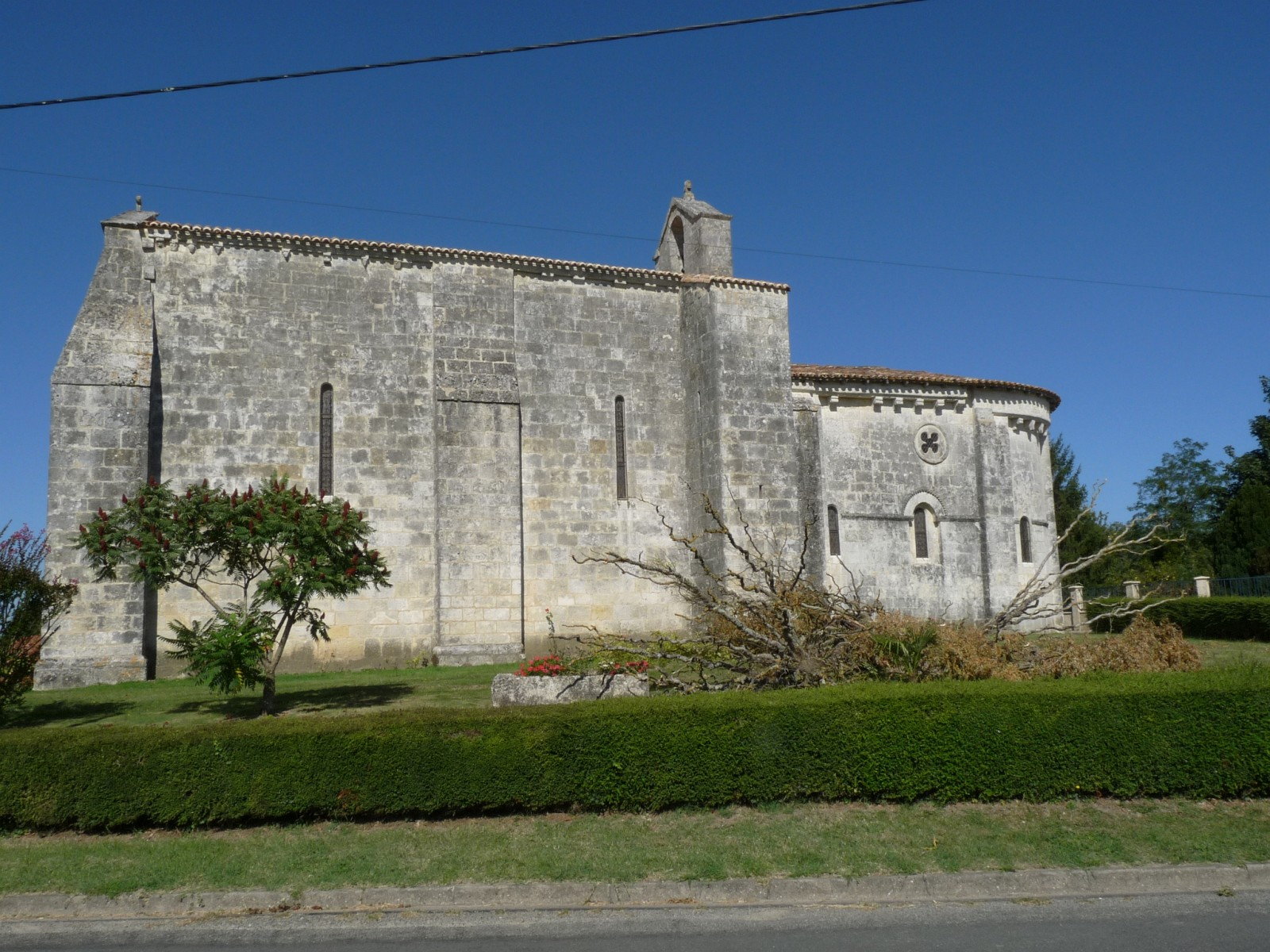 Eglise d'Allas-Bocage, Charente-Maritime, France